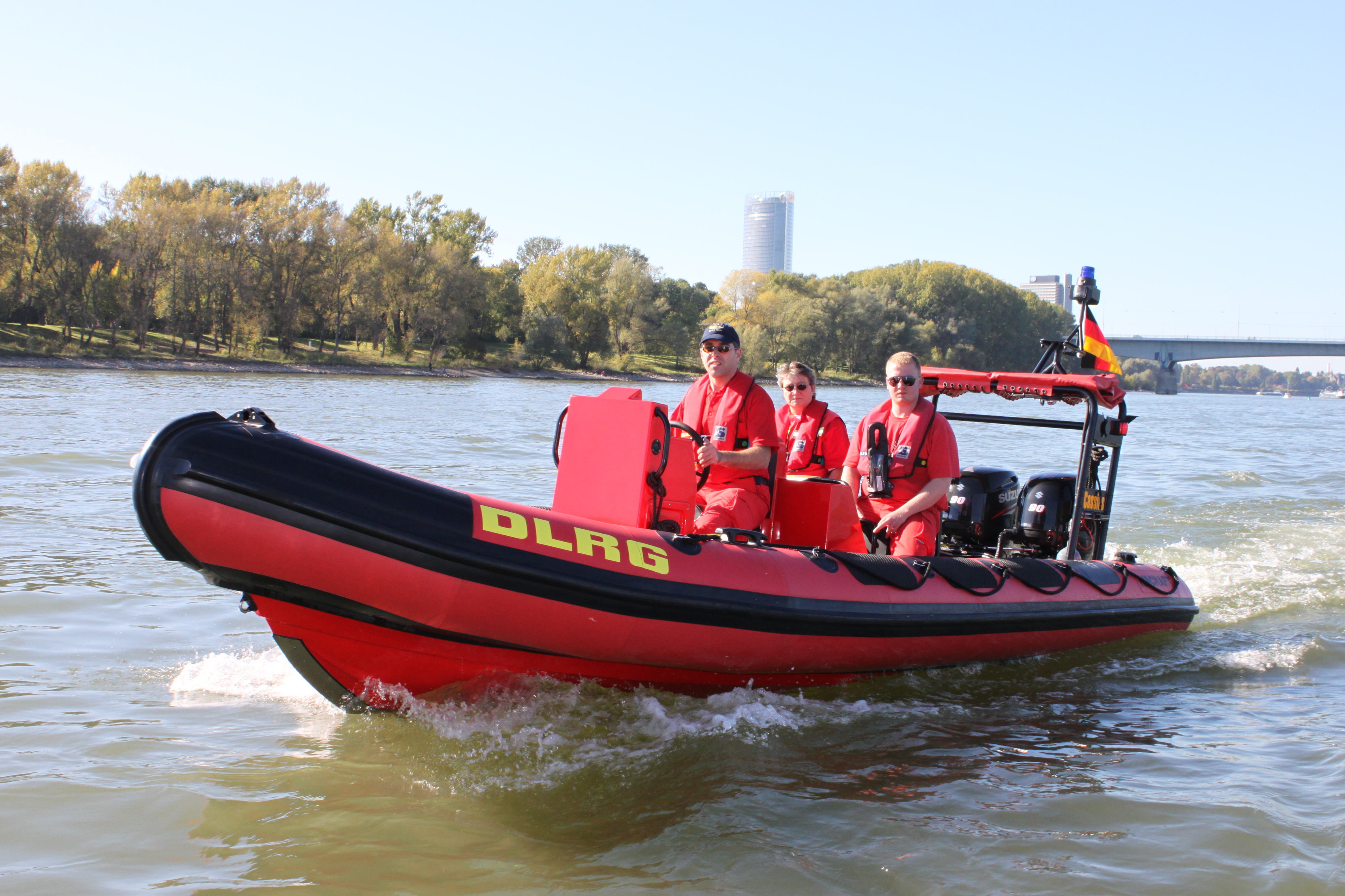 Aufnahme von der Indienststellung des neuen Rettungsbootes der DLRG Bonn